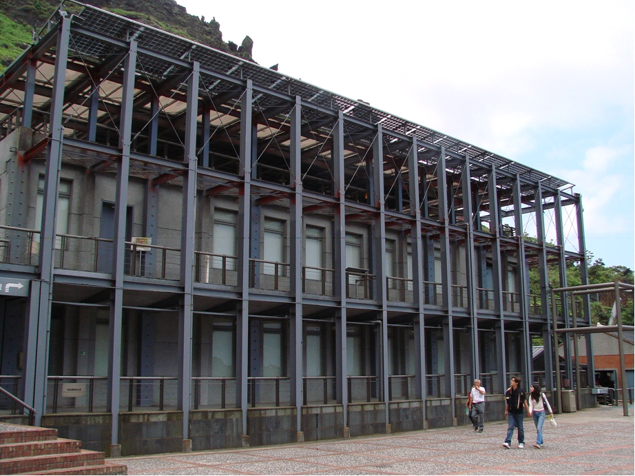 新北市立黃金博物館